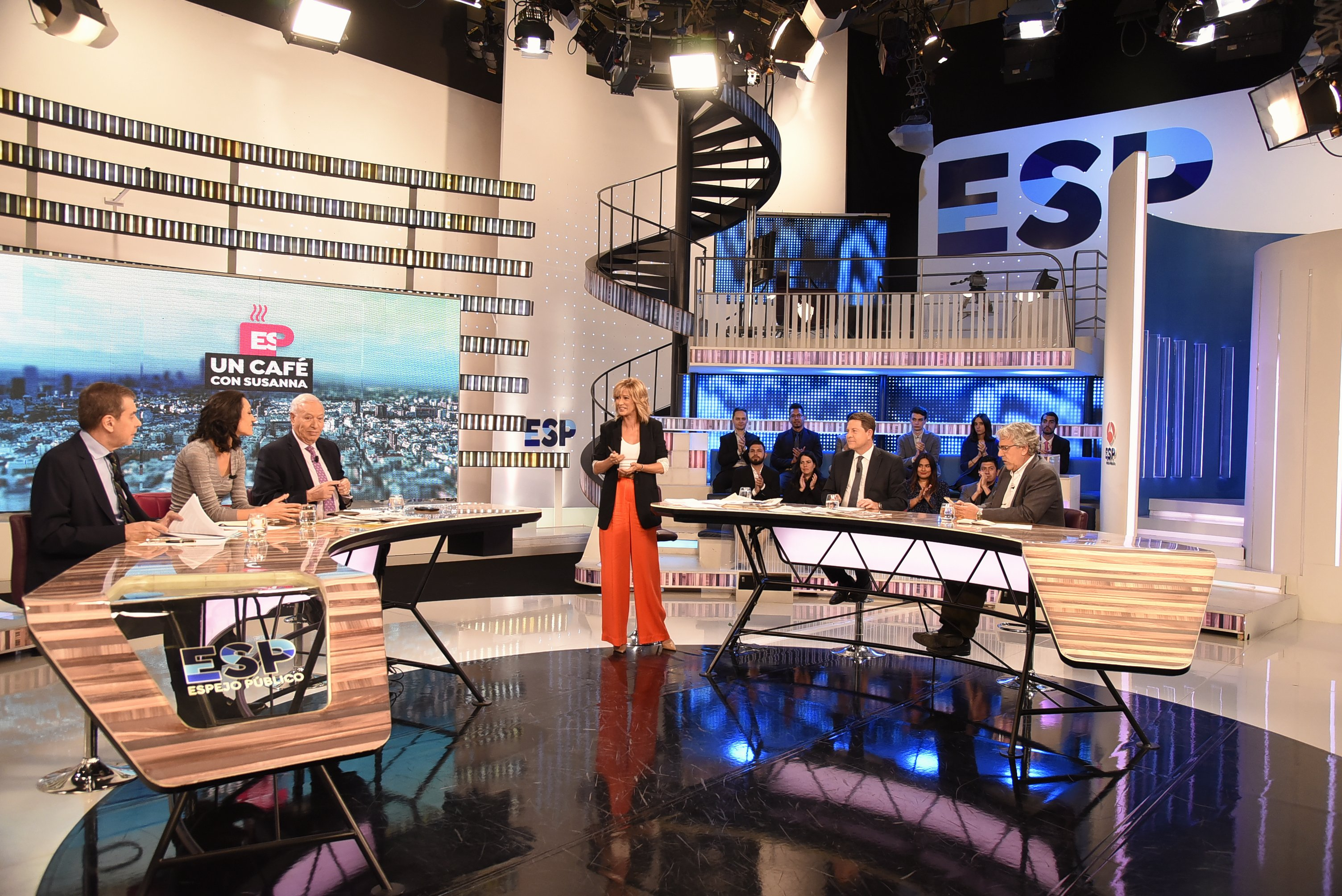 MADRID, 17 de octubre de 2018.- El presidente de Castilla-La Mancha, Emiliano García-Page, es entrevistado por Susanna Griso en el programa 'Espejo Público' de Antena 3 Televisión. (Fotos: José Ramón Márquez // JCCM)